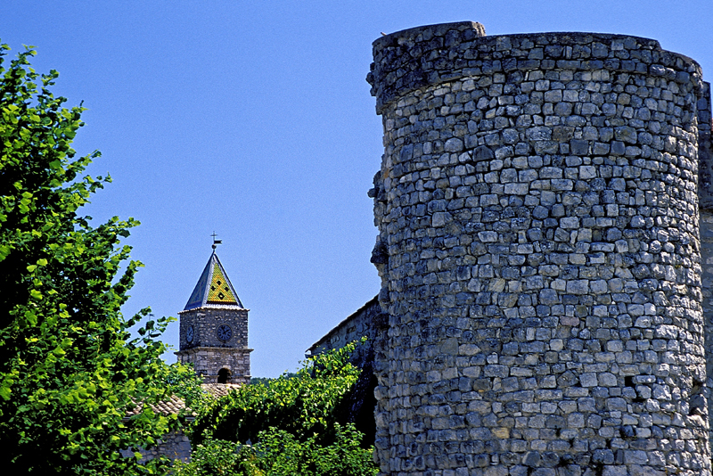 Vue de l'église et d'une vieille tour encore présente.